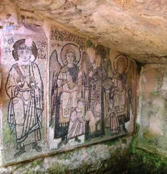 Mosaici anfiteatro di Durazzo